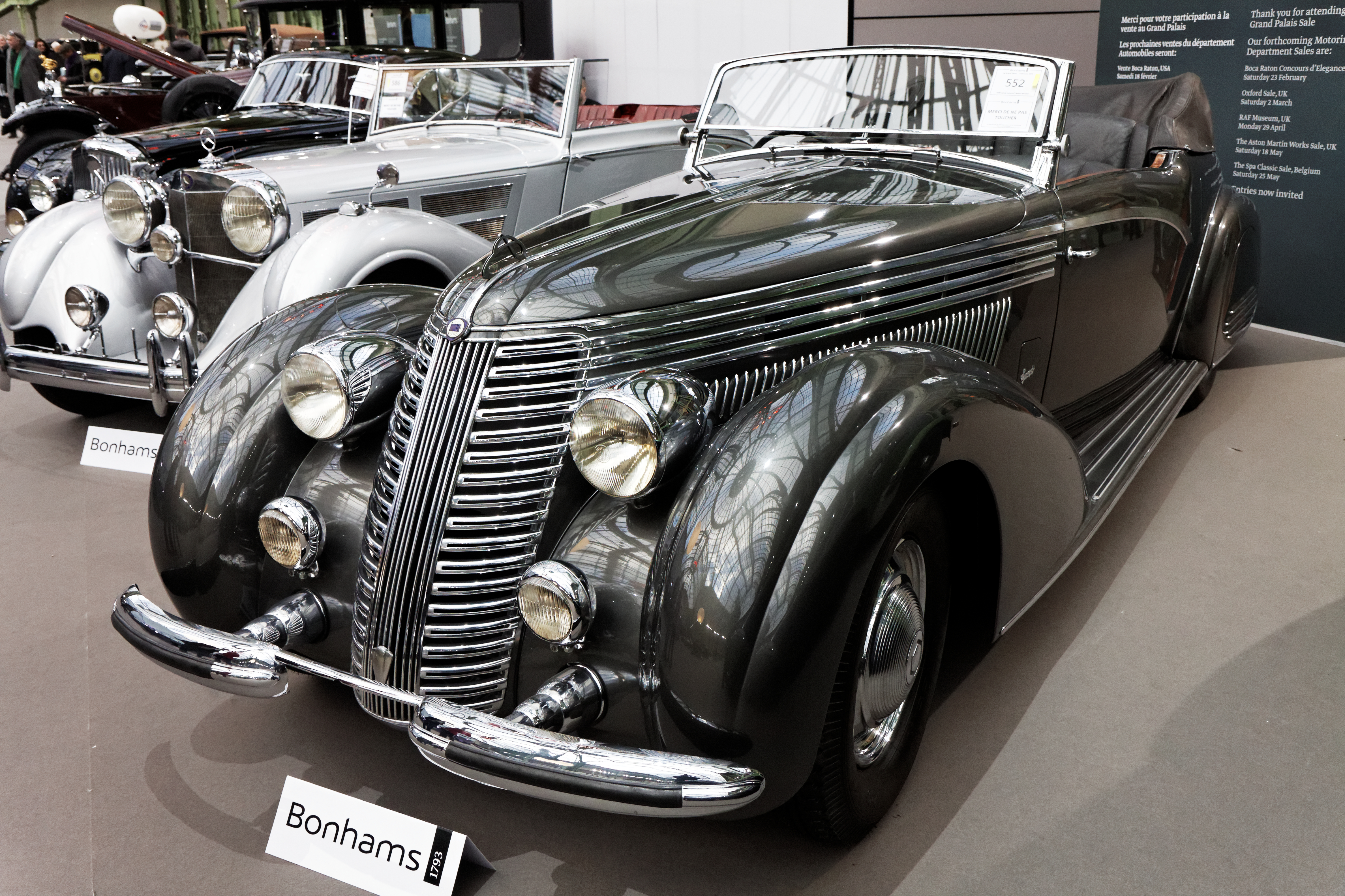 Une Lancia Astura 4e série cabriolet de 1938.